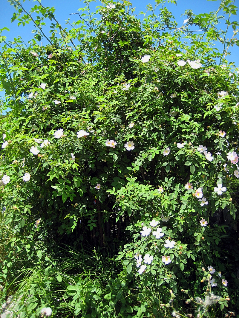 Divlja ruža (Rosa canina), Rijeka